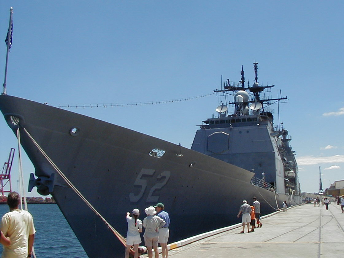 USS Bunker Hill (CG-52) at Fremantle, Western Australia.